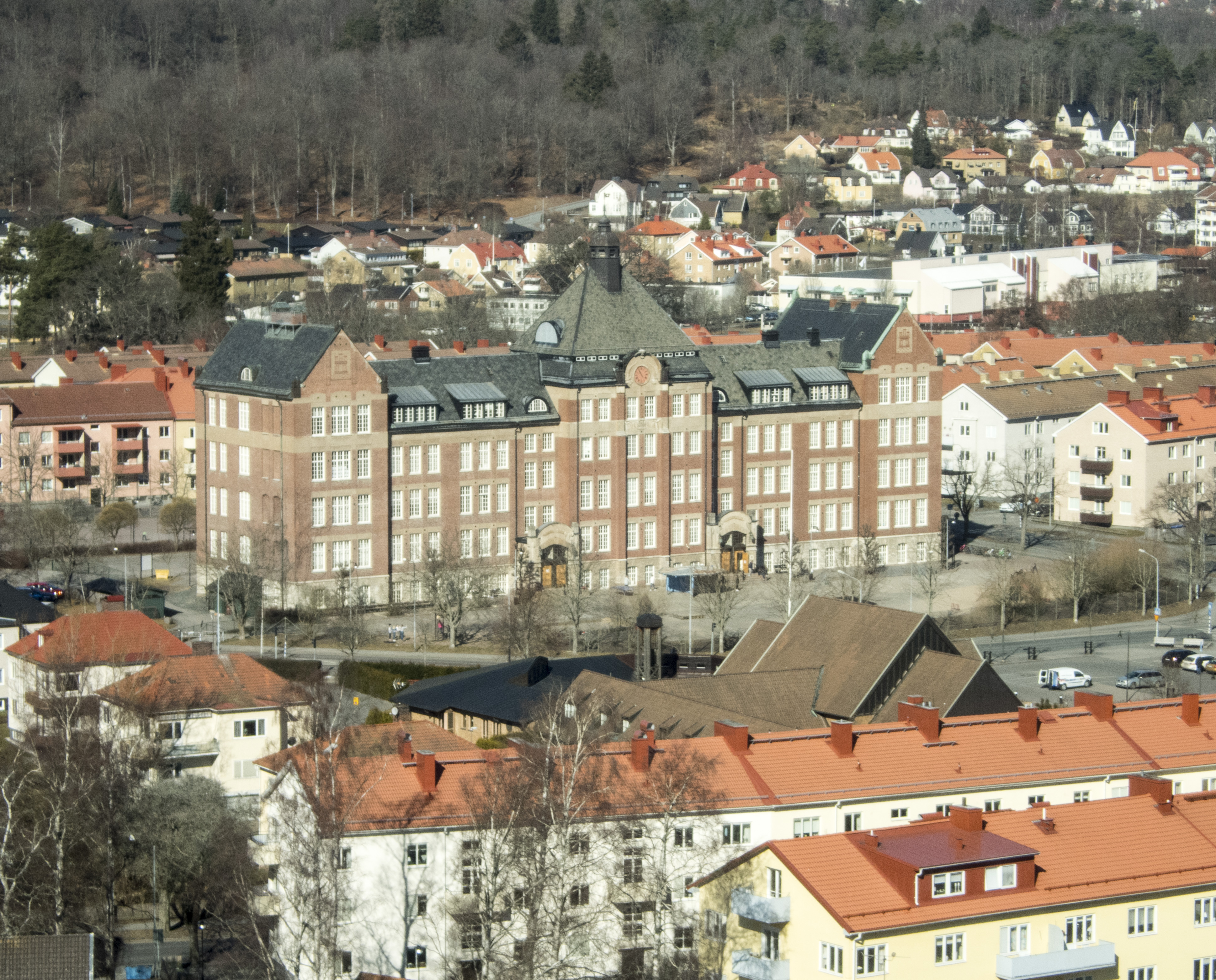 Torpaskolan, Jönköping, ursprungligen Södra Folkskolan. Uppförd 1908 och utbyggd 1923. Arkitekt vid båda etapperna var August Atterström. Jönköpings katolska kyrka mittemot.